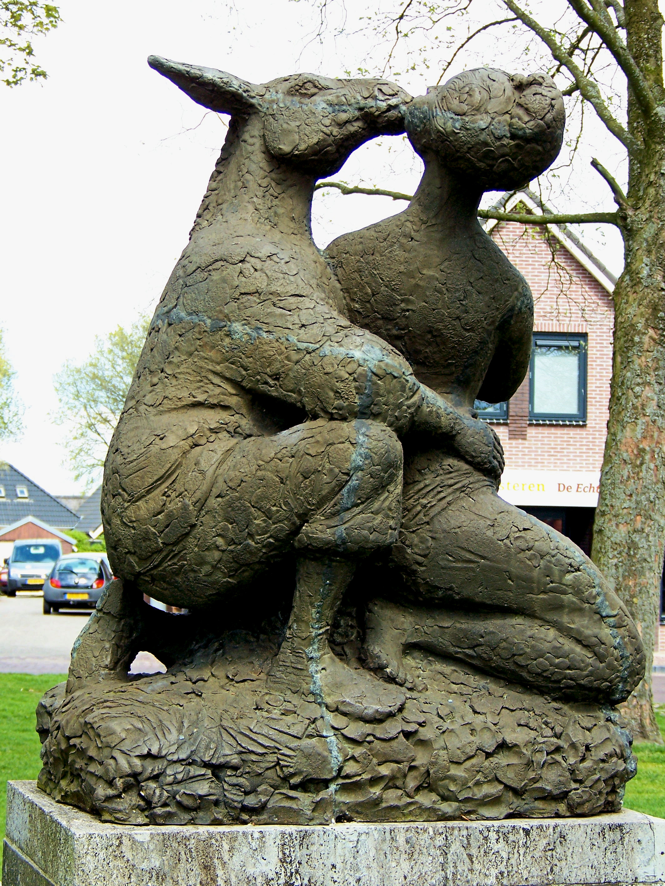 Zicht op het beeldhouwwerk Titania en Spoel de Wever (1971) van Arie Teeuwisse voor de Sint-Pancratiuskerk nabij de brink in Diever Scene from A Midsummer Nights' Dream by Arie Teeuwisse, Diever, 1971